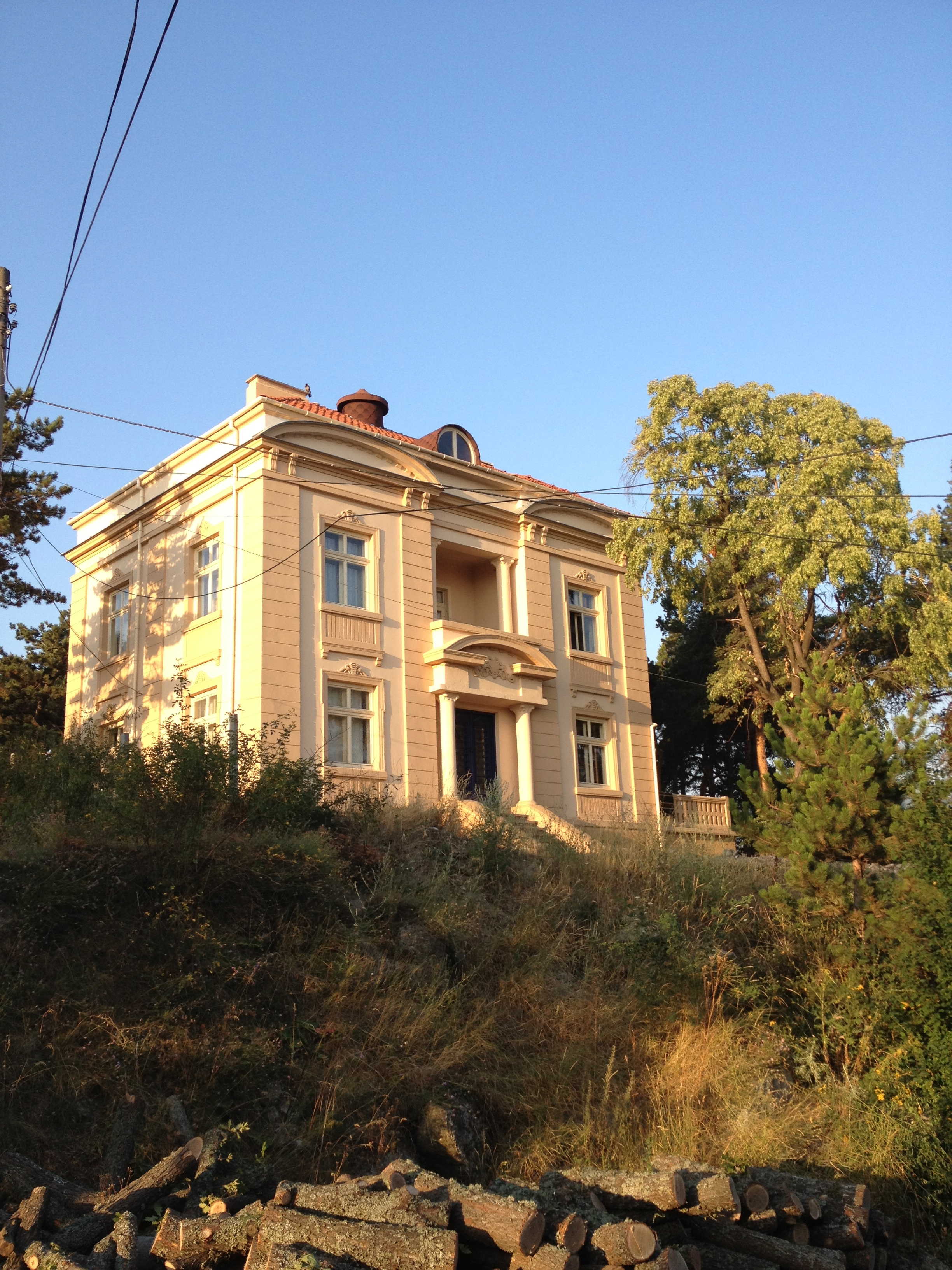 Photo prise par l'auteur.